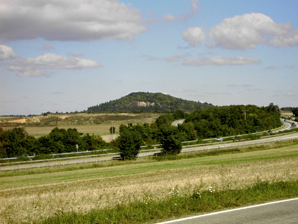 Blick aus südwestlicher Richtung zum Karmelenberg (bewaldete Kuppe im Naturschutzgebiet „Karmelenberg“ in Bassenheim), im Vordergrund die A 48 Koblenz–Trier